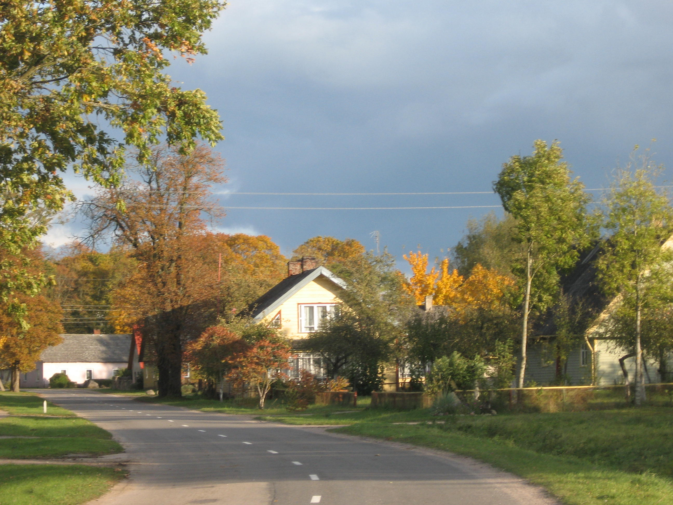 Katyčiai